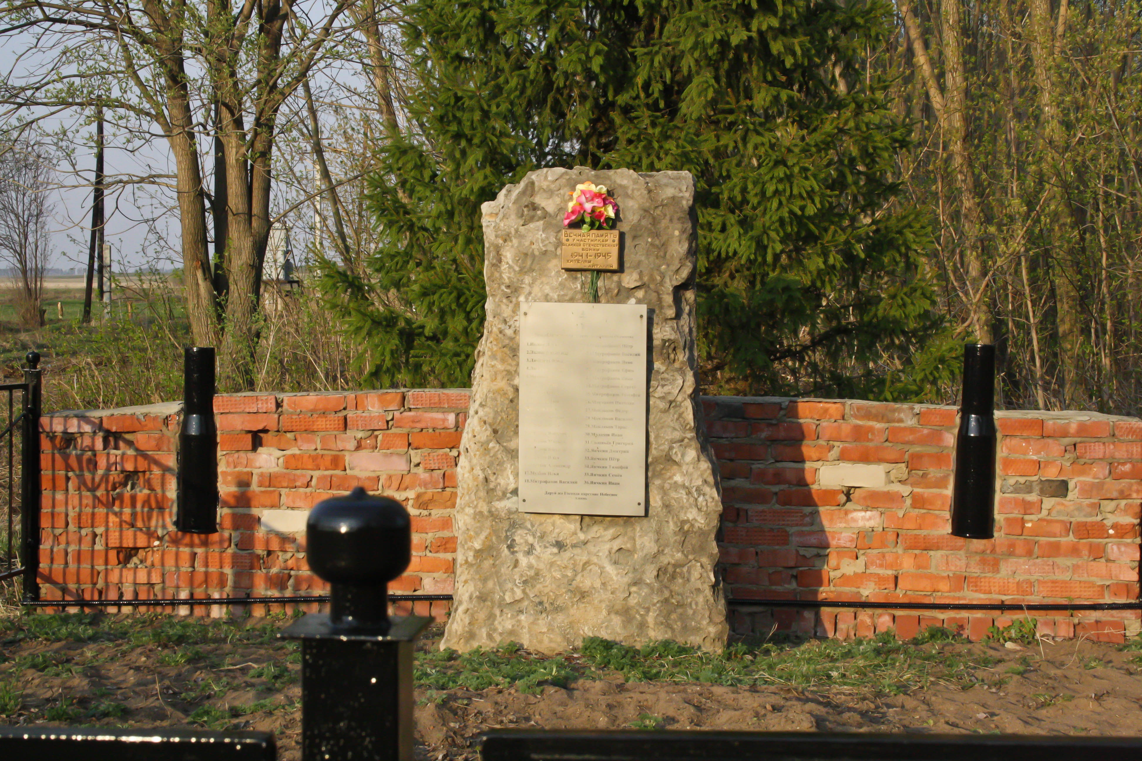 Памятный камень в честь односельчан – участников Второй мировой войны в деревне Айталан (Республика Татарстан, Россия)